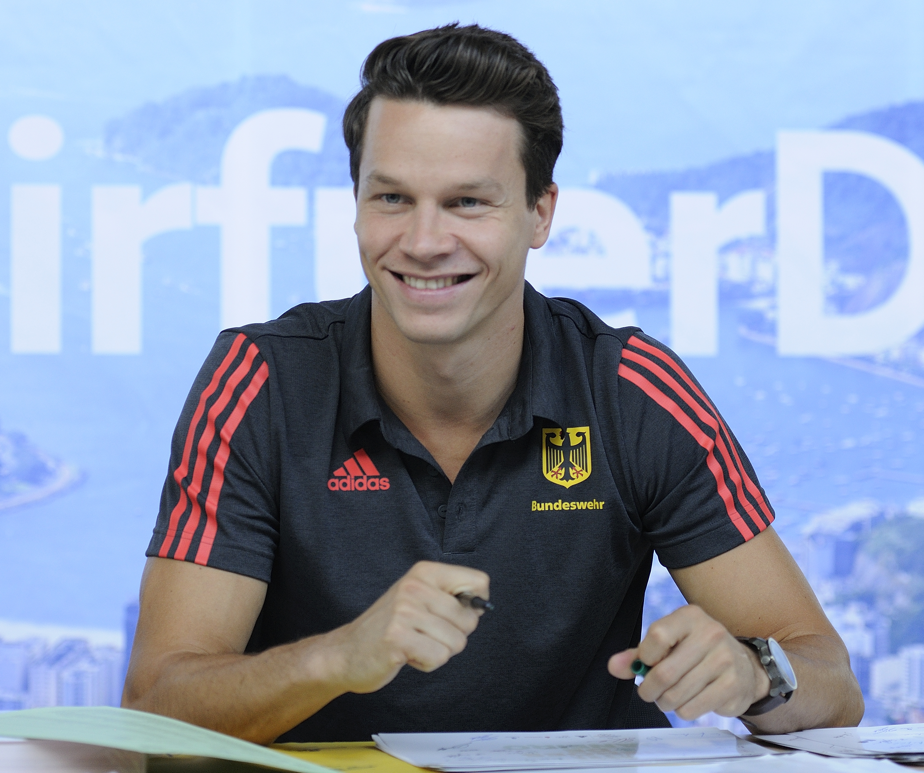 Bild aufgenommen in Hannover während der Einkleidung der deutschen Olympiamannschaft 2016. Patrick Hausding.